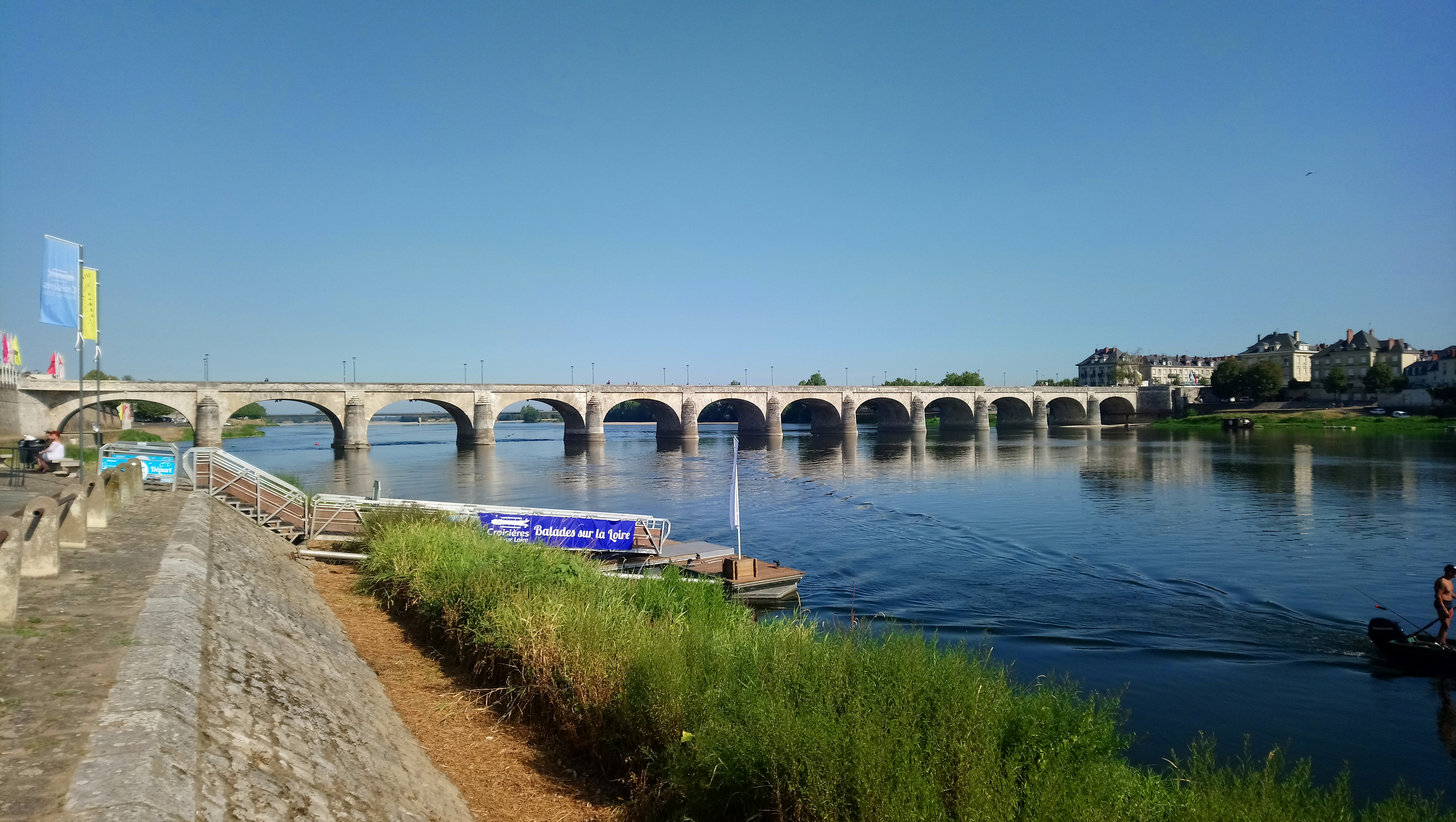 Pont reliant Saumur à l'île d'Offard sur la Loire